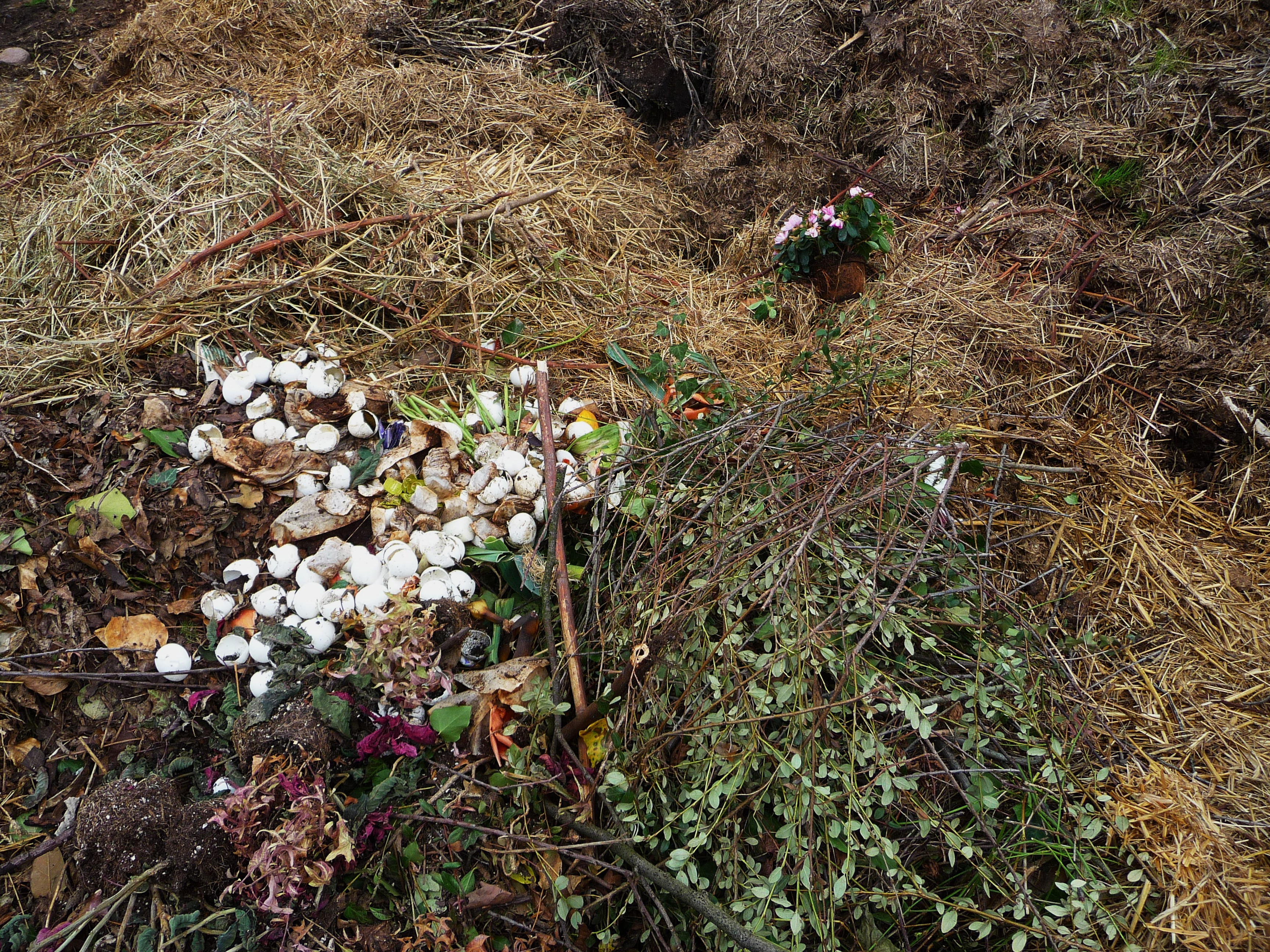 Misthaufen und Kompost, fotografiert in Deutschland